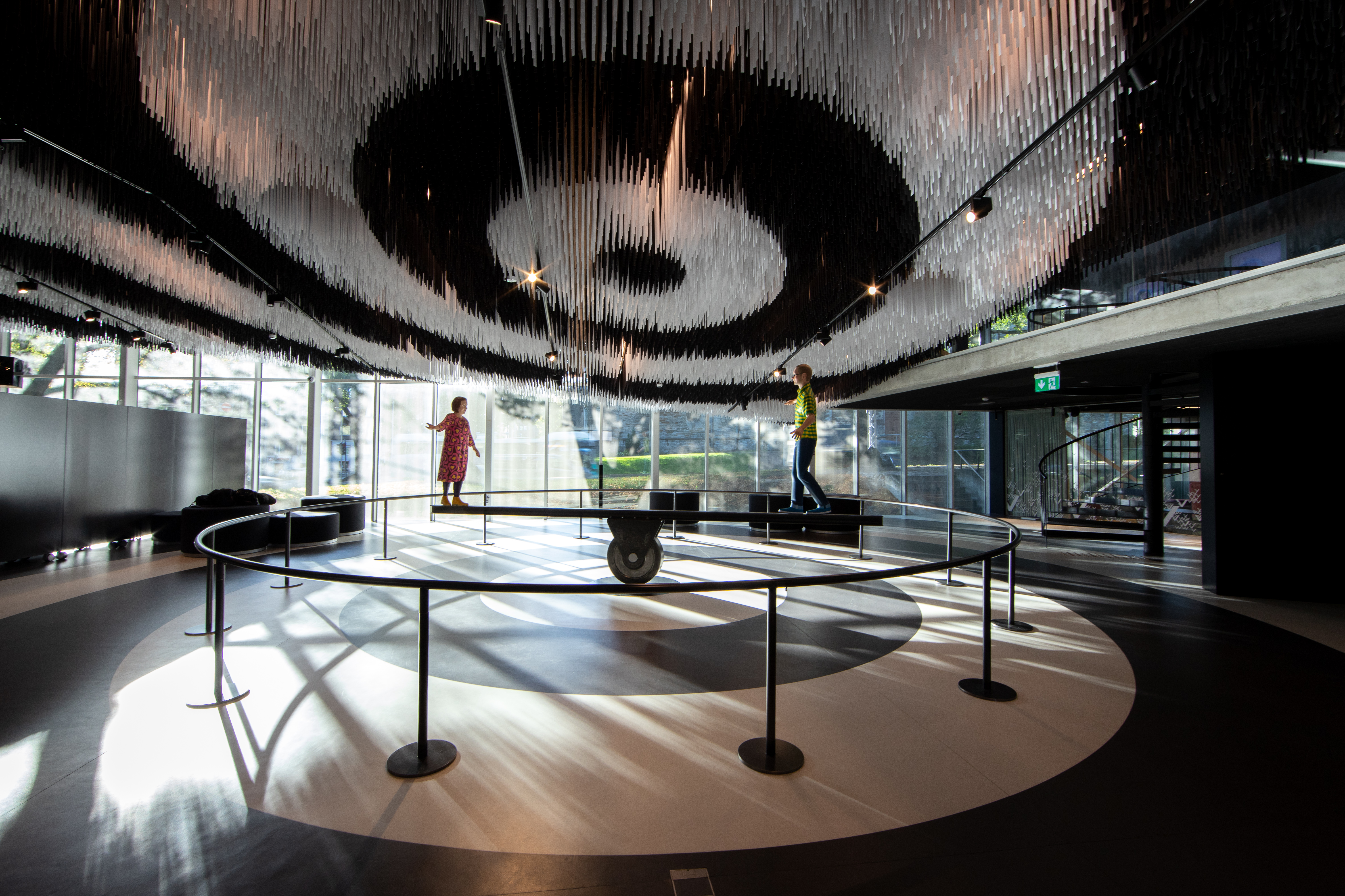 Püsinäitus "Vabadusel ei ole piire"